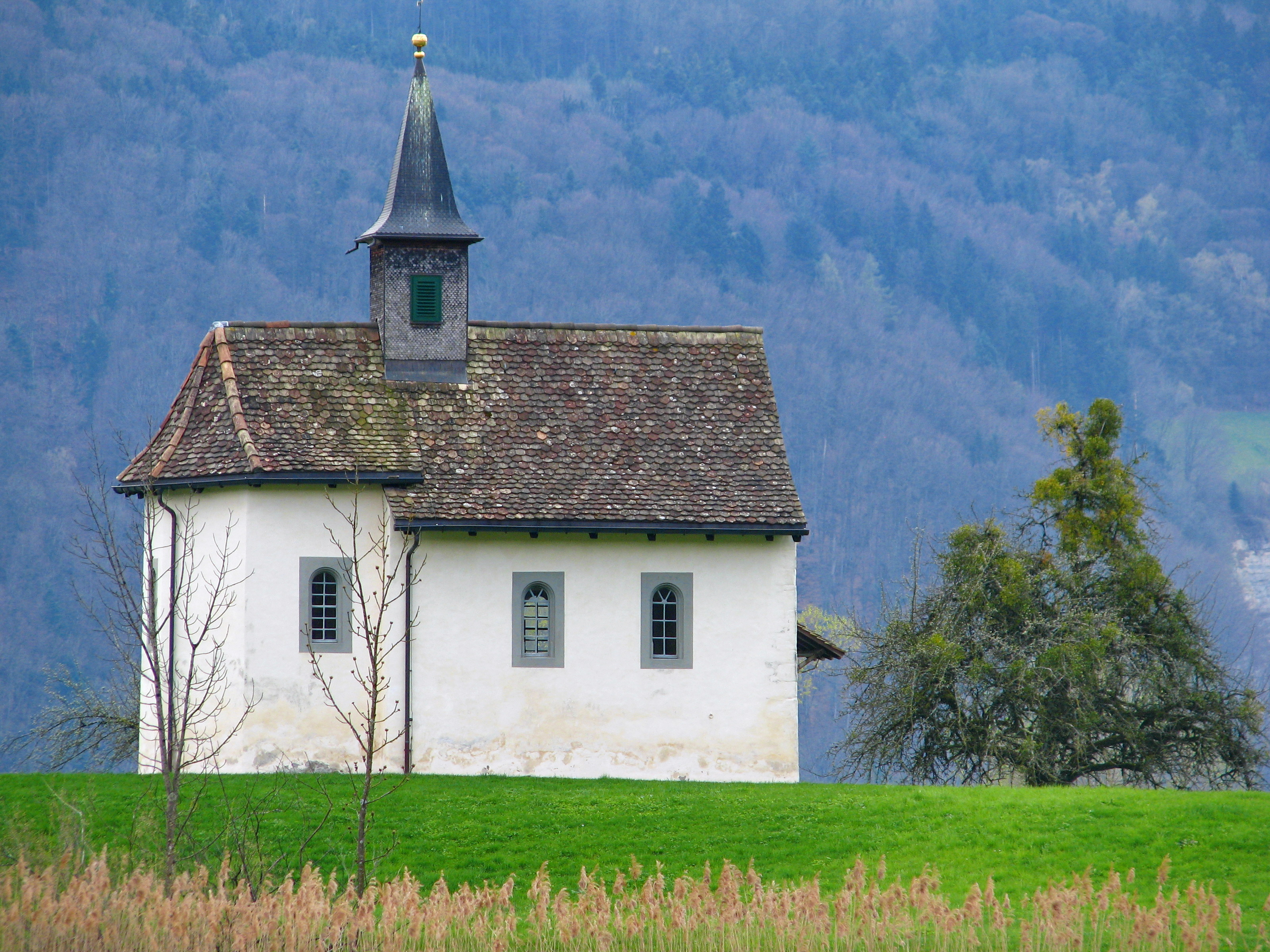 St. Meinrad Kapelle in Bollingen on Obersee (upper Lake Zürich) shore